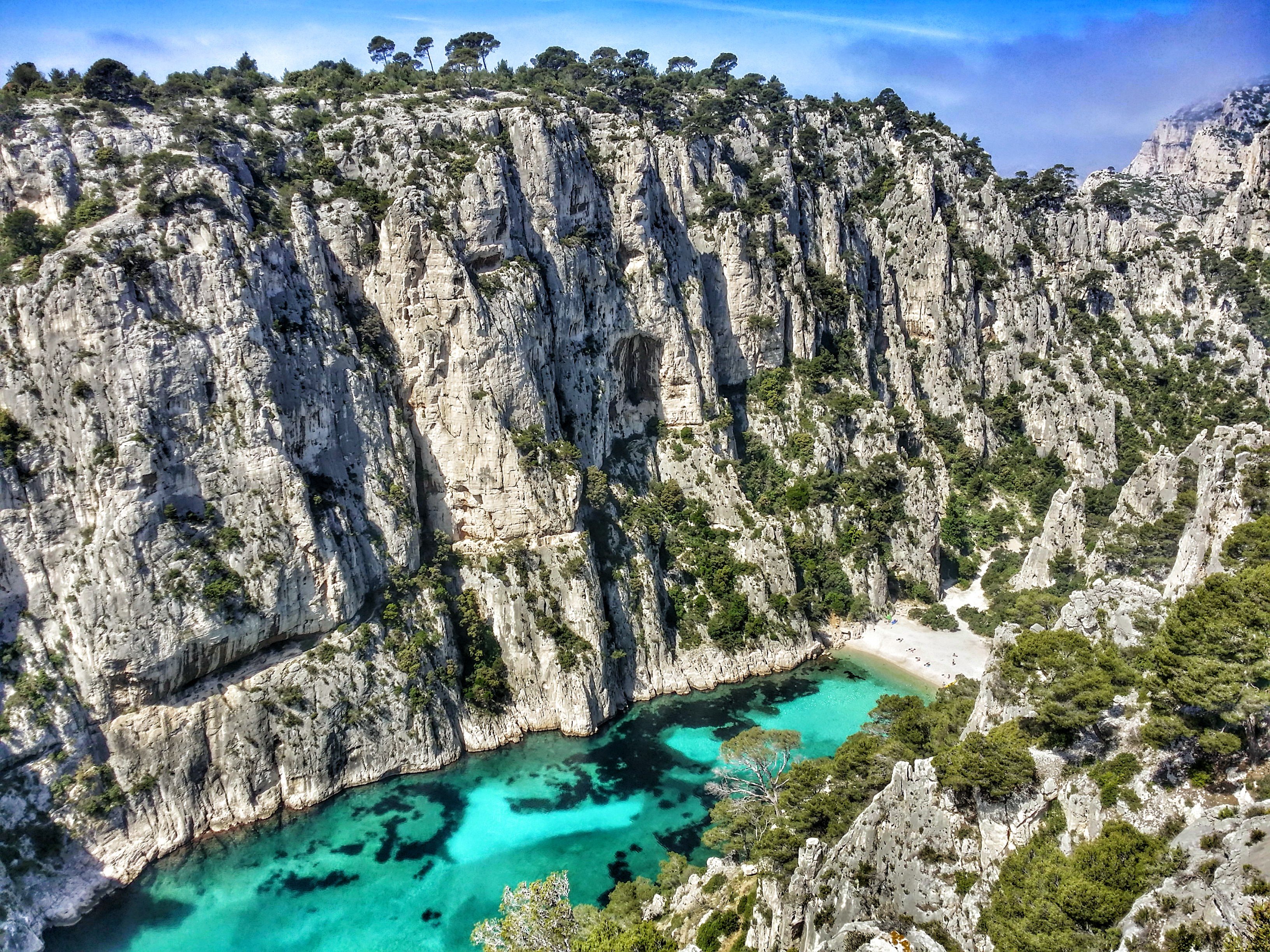 Calanques d'En Vaux